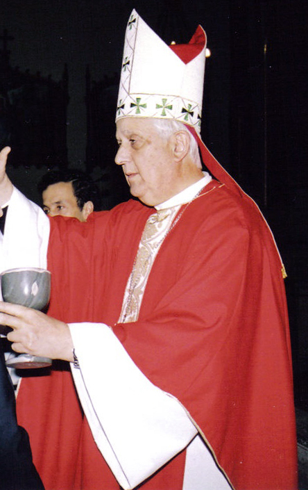 Alejandro Goic Karmelic, Obispo de Rancagua.